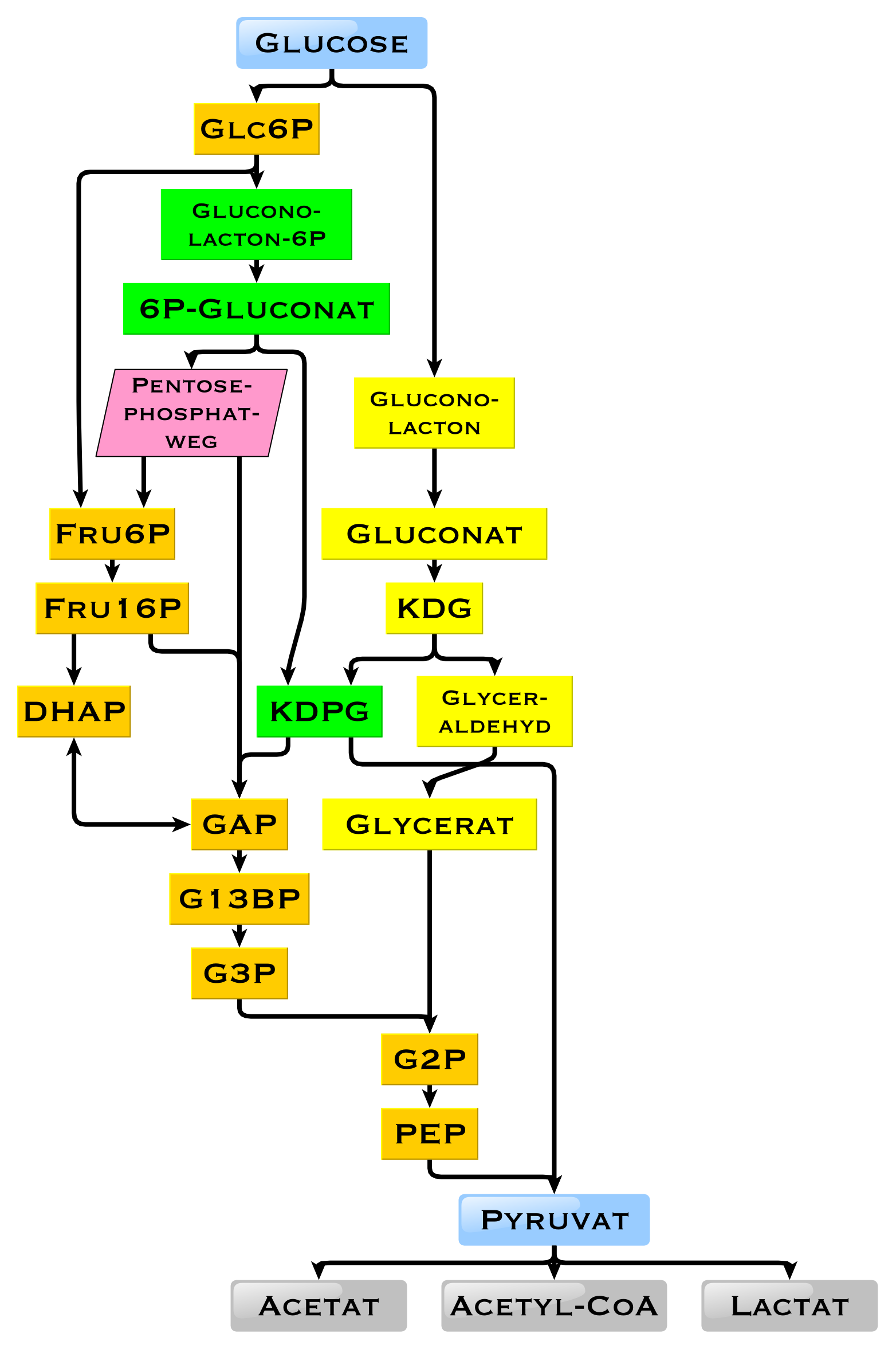 Graph, der die möglichen Zwischenprodukte beim Glucoseabbau zeigt. Orange: Glycolyse. Grün: Entner-Doudoroff-Weg, phosphorylierend. Gelb: Entner-Doudoroff-Weg, nicht-phosphorylierend.